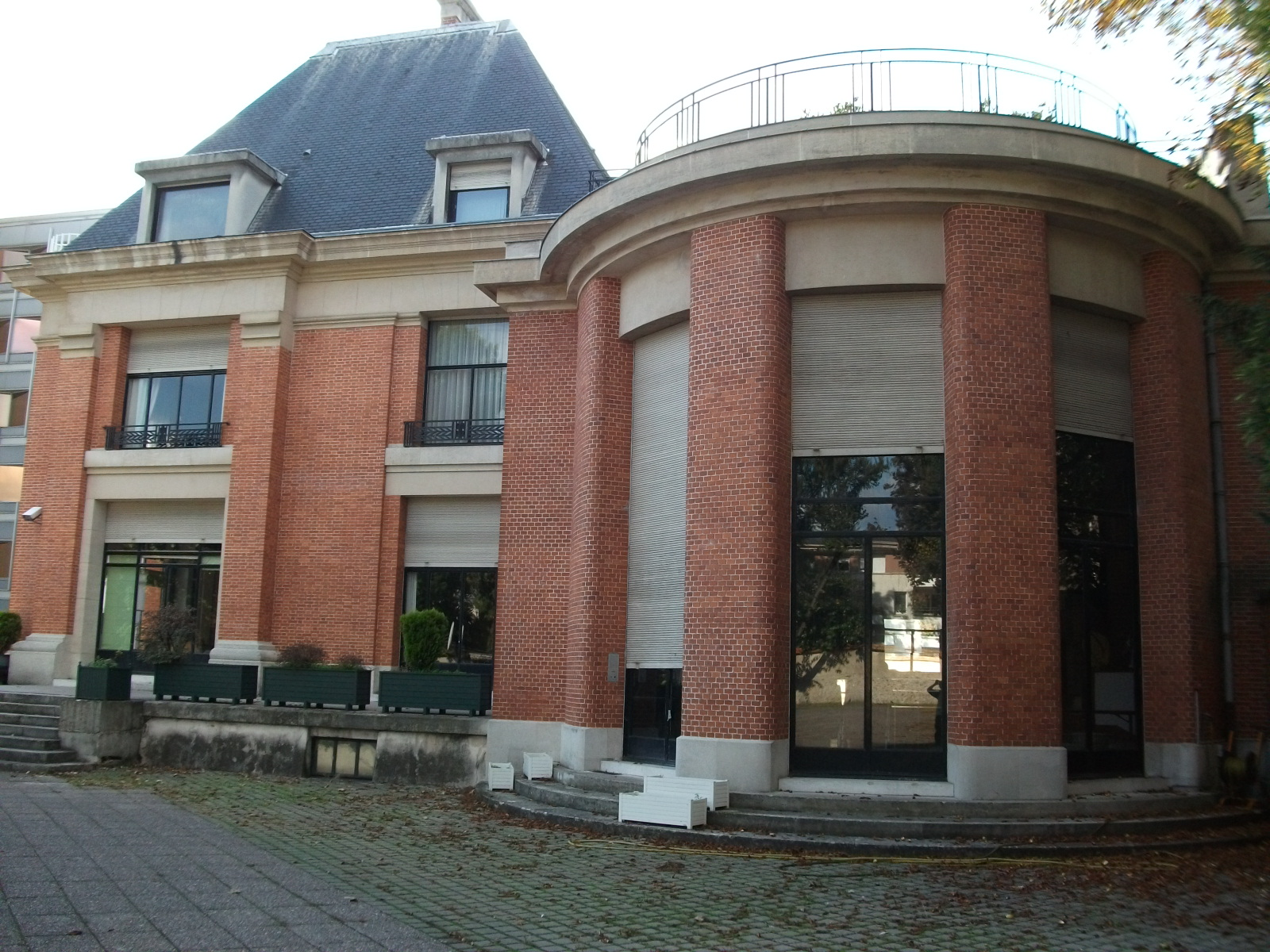 vue de la Villa douce depuis le jardin, l'arrondi de la salle de musique.